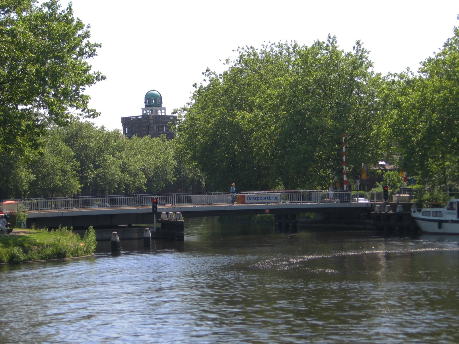 Bridges in Delft, 11 juni